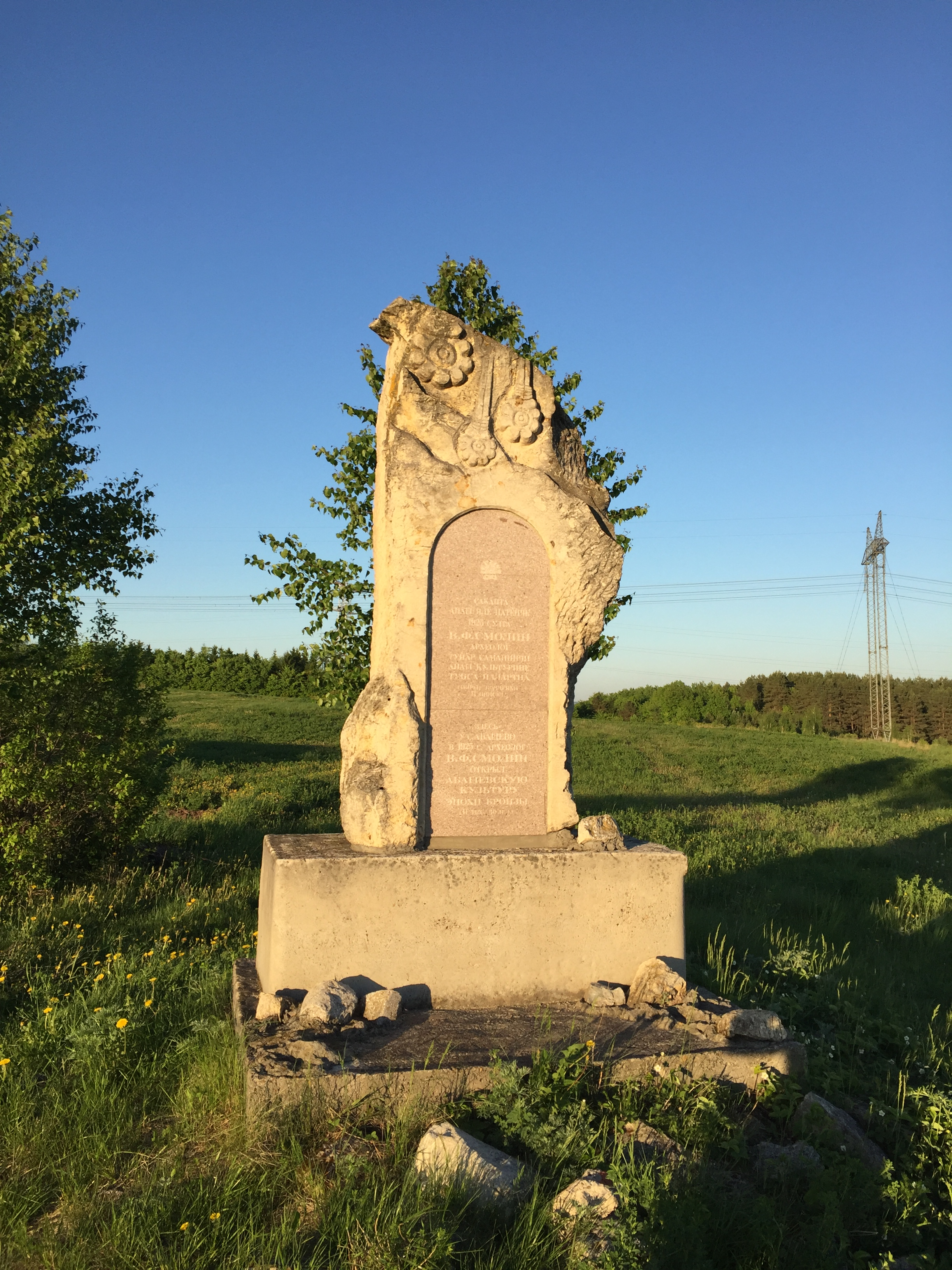 Памятник.